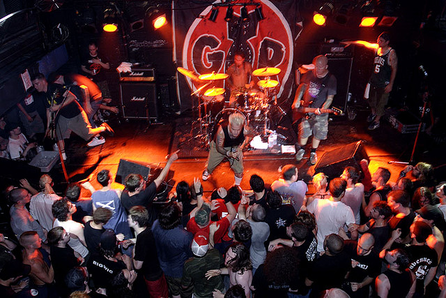 Fuente: ( Autor: Desconocido